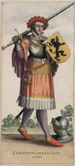 Graaf Lodewijk. Zijn Latijnse benaming luidde Ludovicus Cressiacus - Lodewijk van Crécy - Flandria Illustrata (1641)